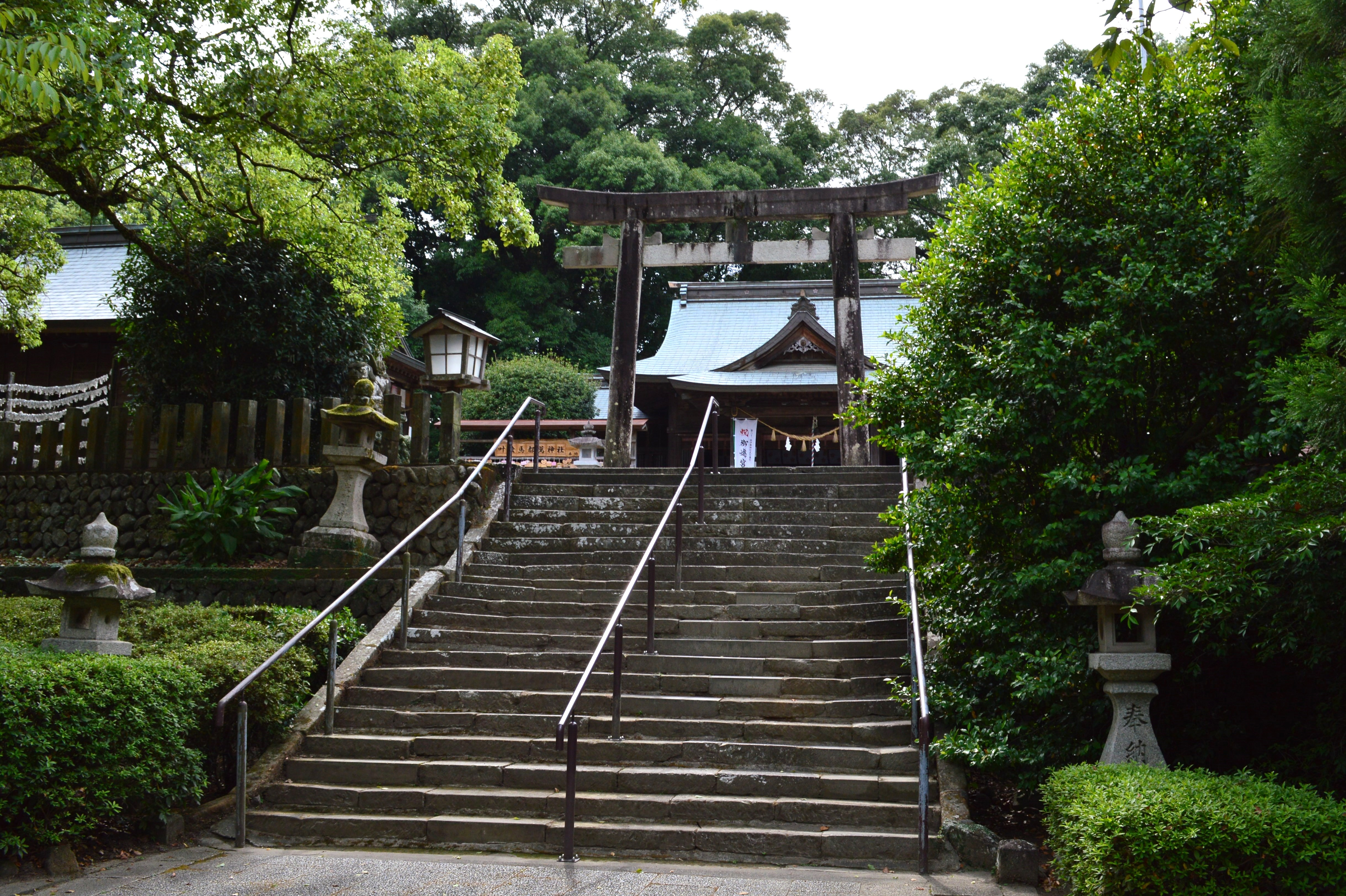 都萬神社 境内入り口